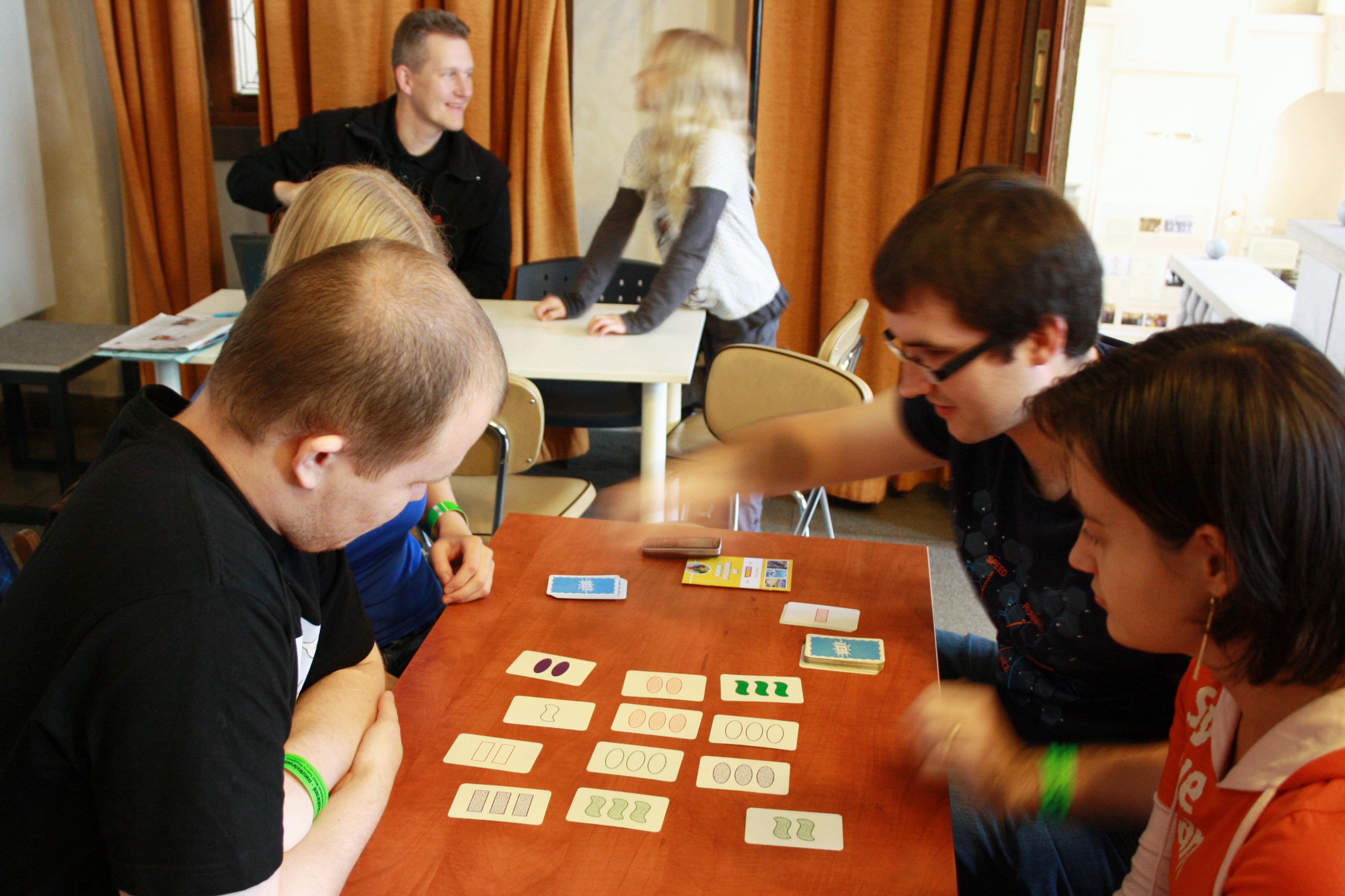 Deskohraní 2012